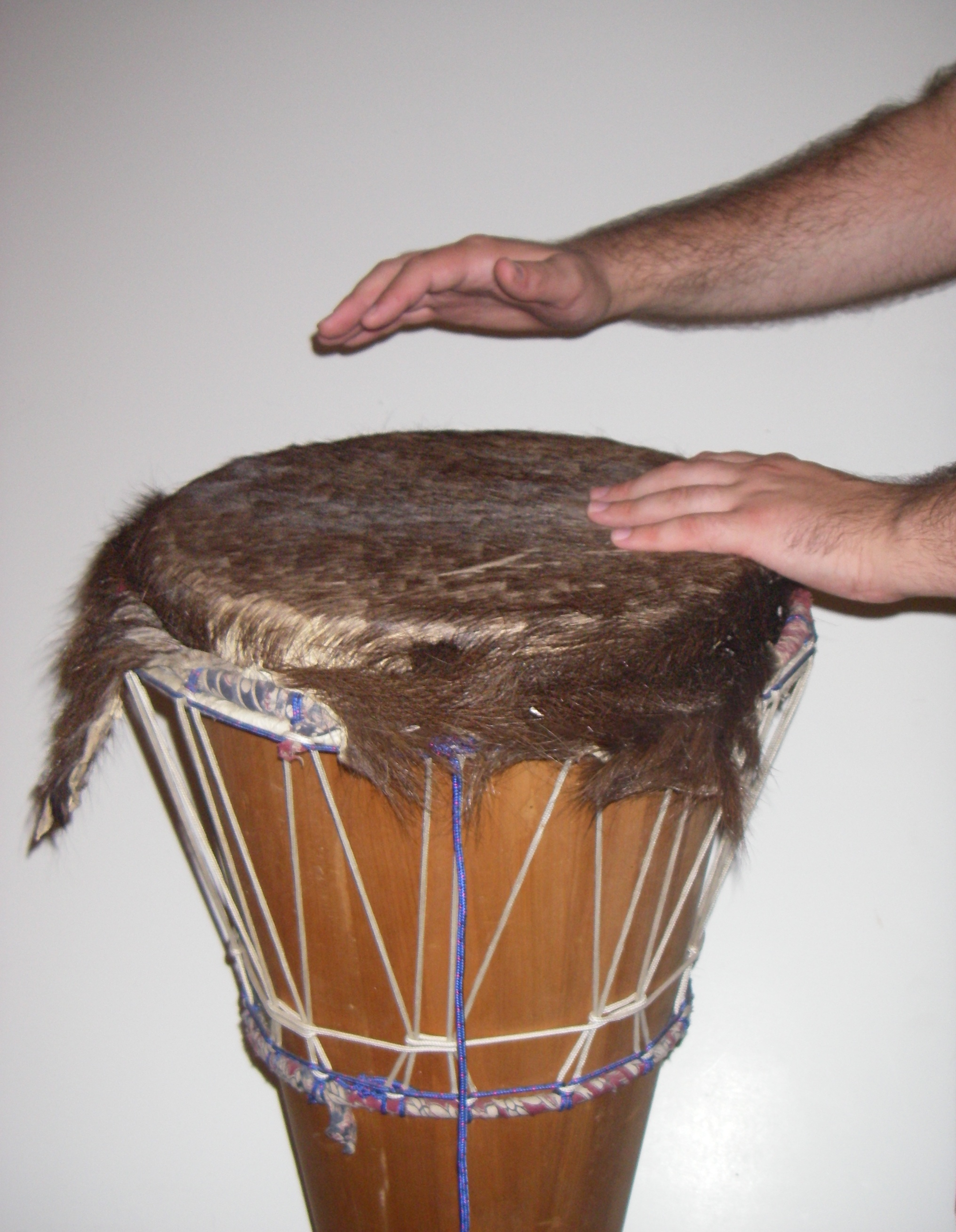 Ludado je funela tamburo.